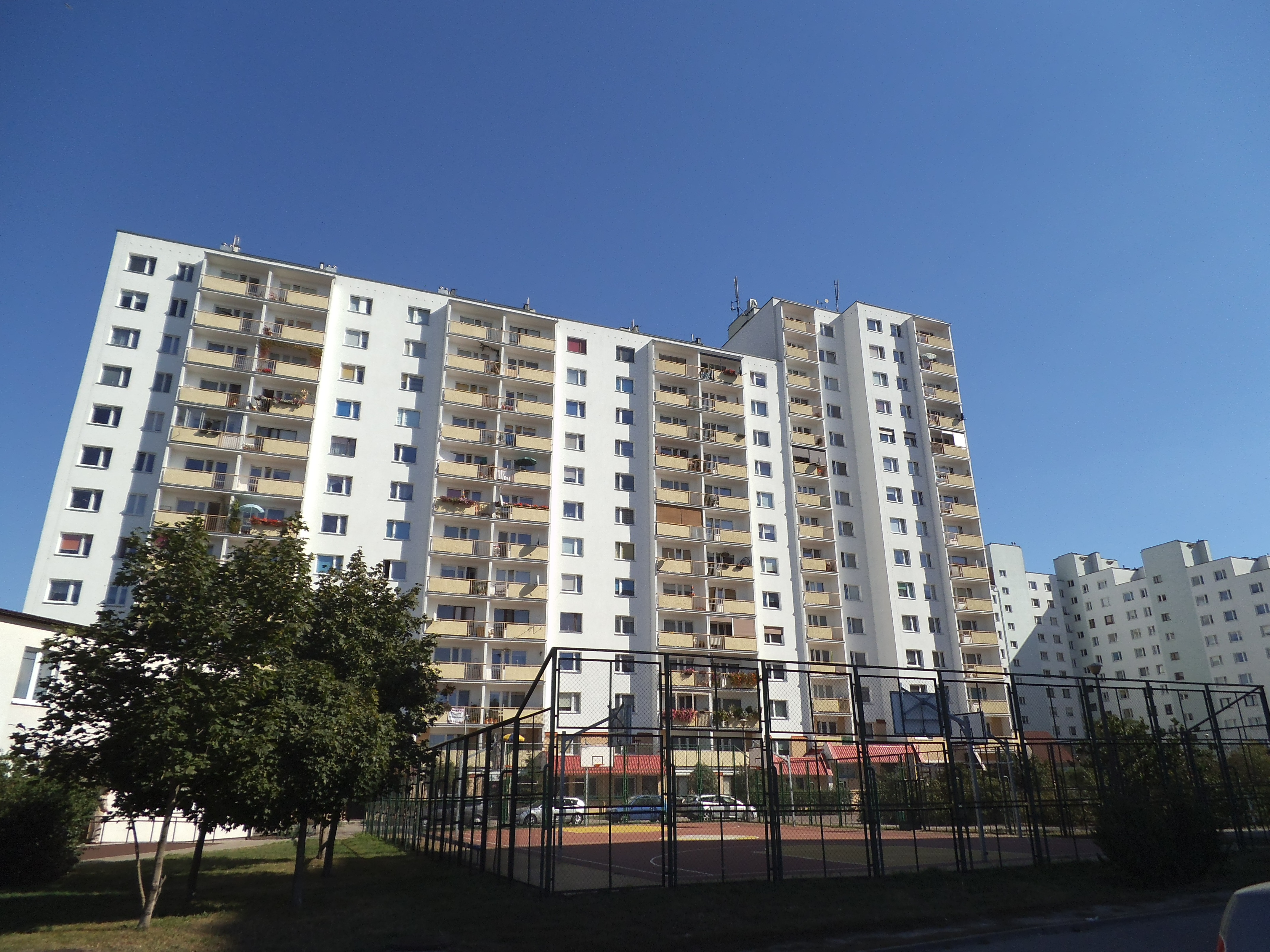 Fragment zabudowy wielorodzinnej przy ulicy Ślaskiego w Toruniu